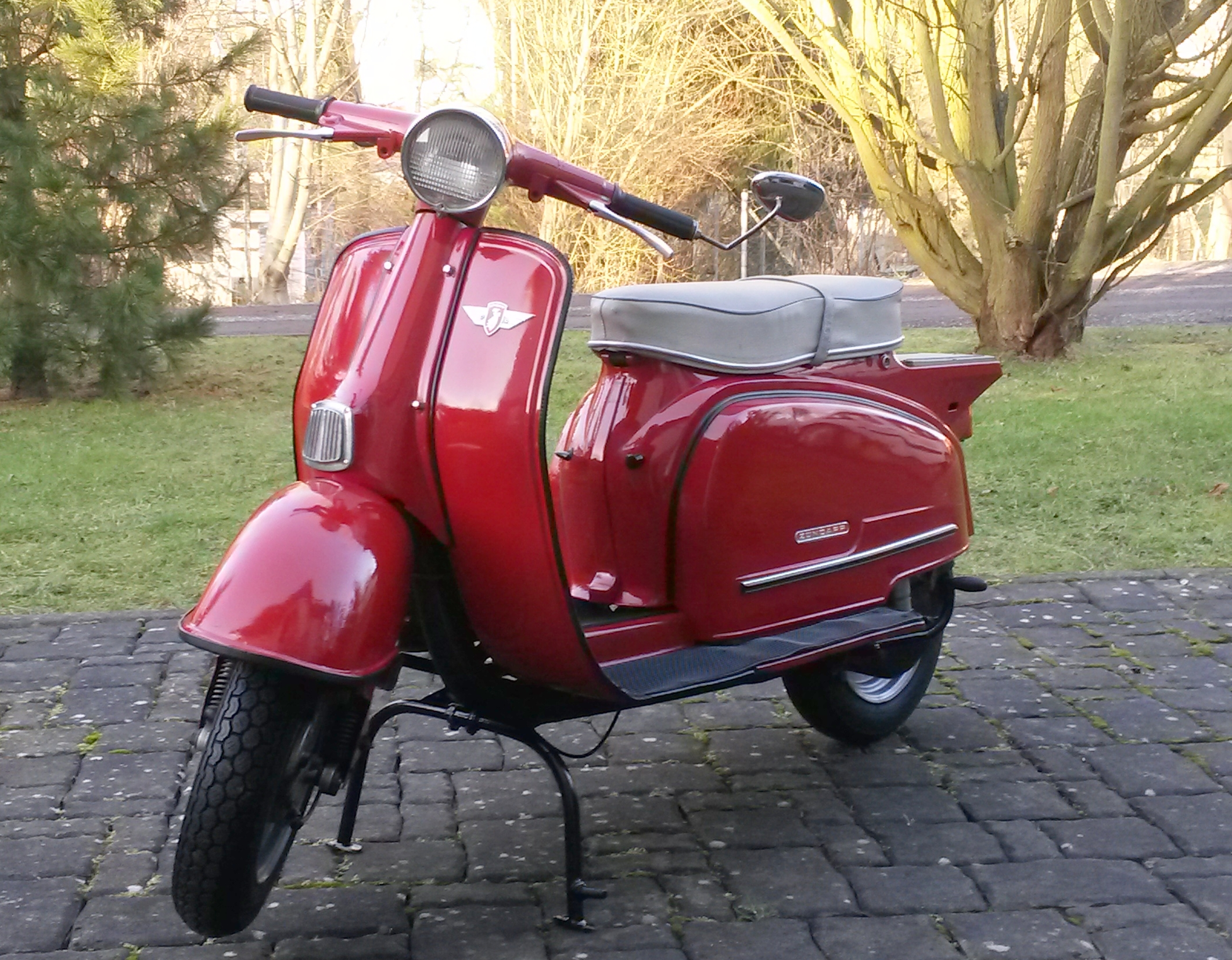 Zündapp R 50, Roller, Baujahr 1970, Typ 561 003, 3-Gang-Handschaltung, 2,85 PS